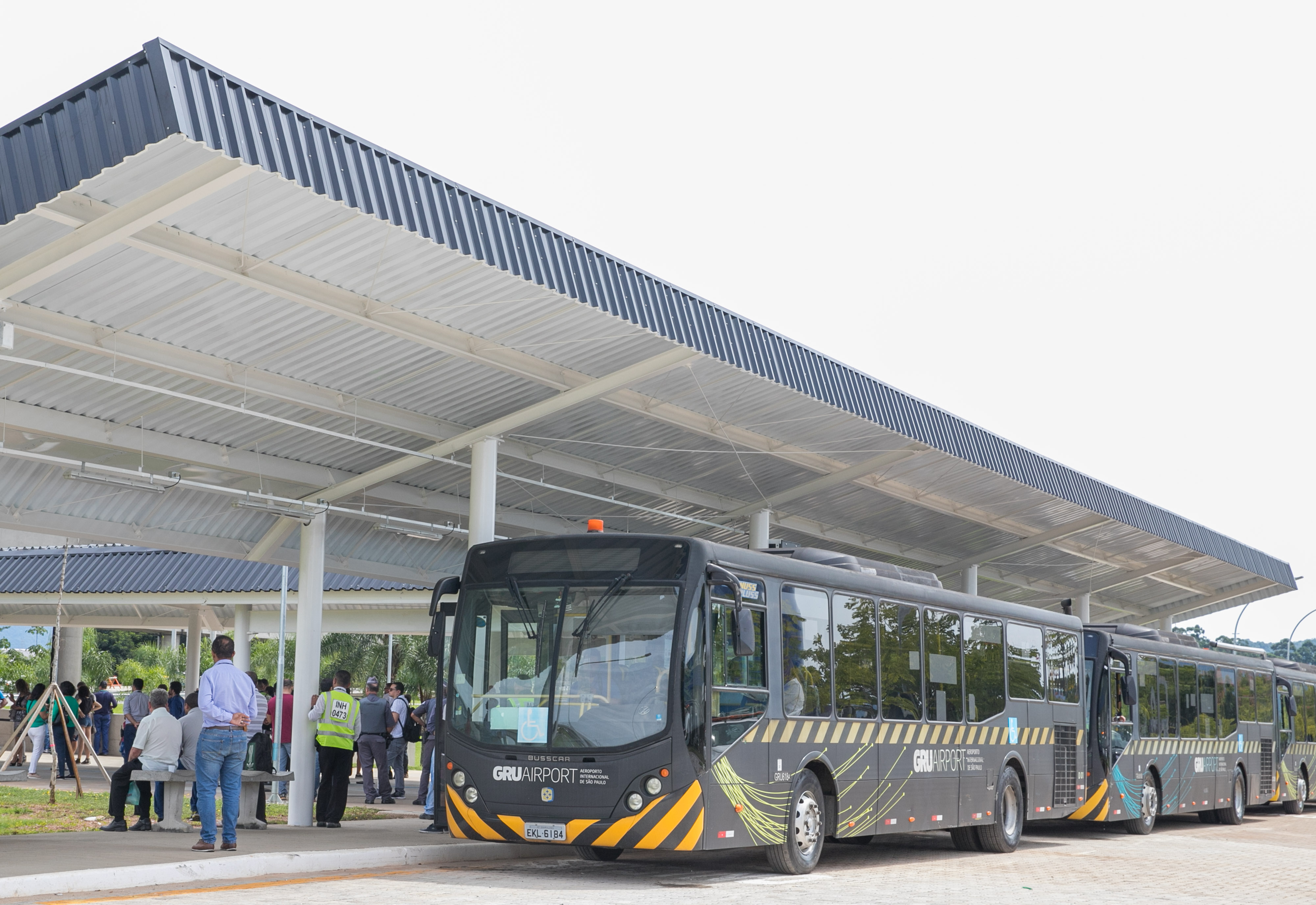 Ônibus gratuito de integração entre a linha 13 - Jade da CPTM e os Terminais do Aeroporto de Guarulhos. Local: Guarulhos/ SP Data: 31/03/2018 Foto: Governo do Estado de São Paulo